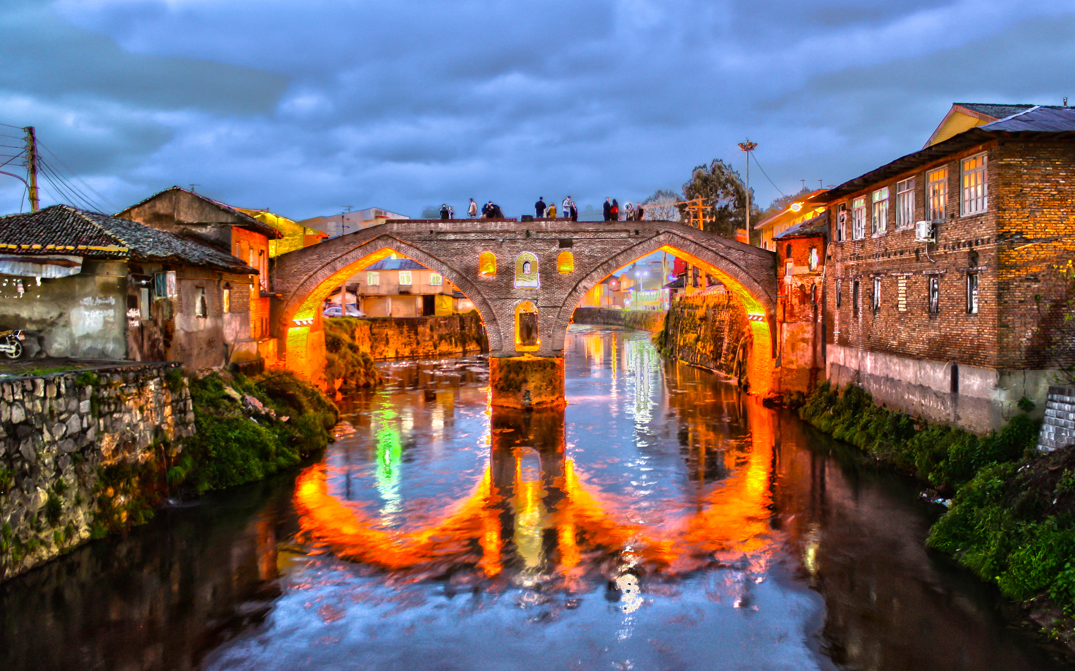 پل خشتی لنگرود بر روی رودخانه لنگرود واقع شده و آب آن از یکی از نهرهای سفید رود است و از داخل شهر می گذرد. این پل به عنوان معروف‌ ترین بنای تاریخی و نماد شهر لنگرود شناخته شده است پل خشتی یا خشته پل یا خشته پورد مربوط به دوره تیموری و صفویه است. این پل با آجر و ساروج ساخته شده و دارای ۳۷ متر طول و ۱۲ متر ارتفاع است